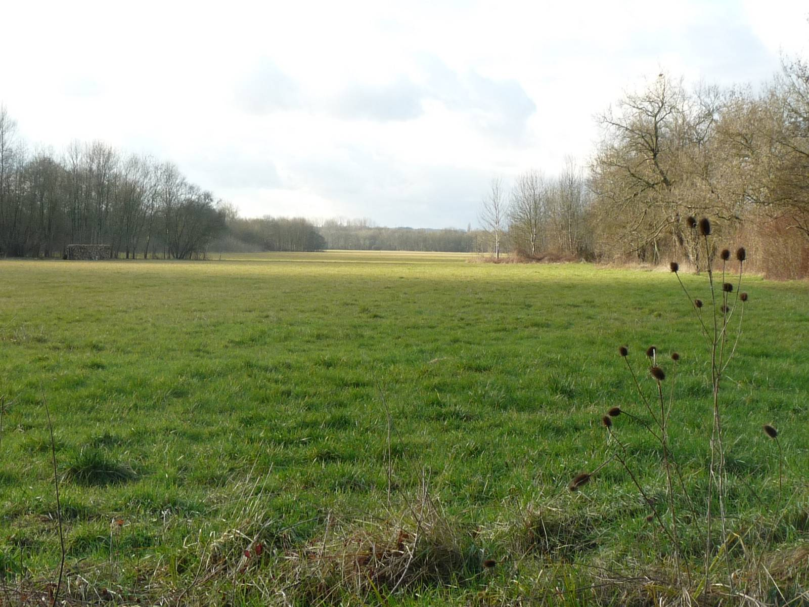 la Petite Prairie à St-Yrieix (16), France